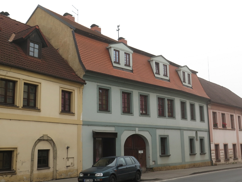 Měšťanský dům, Černínská 34, Město Touškov, Město Touškov.